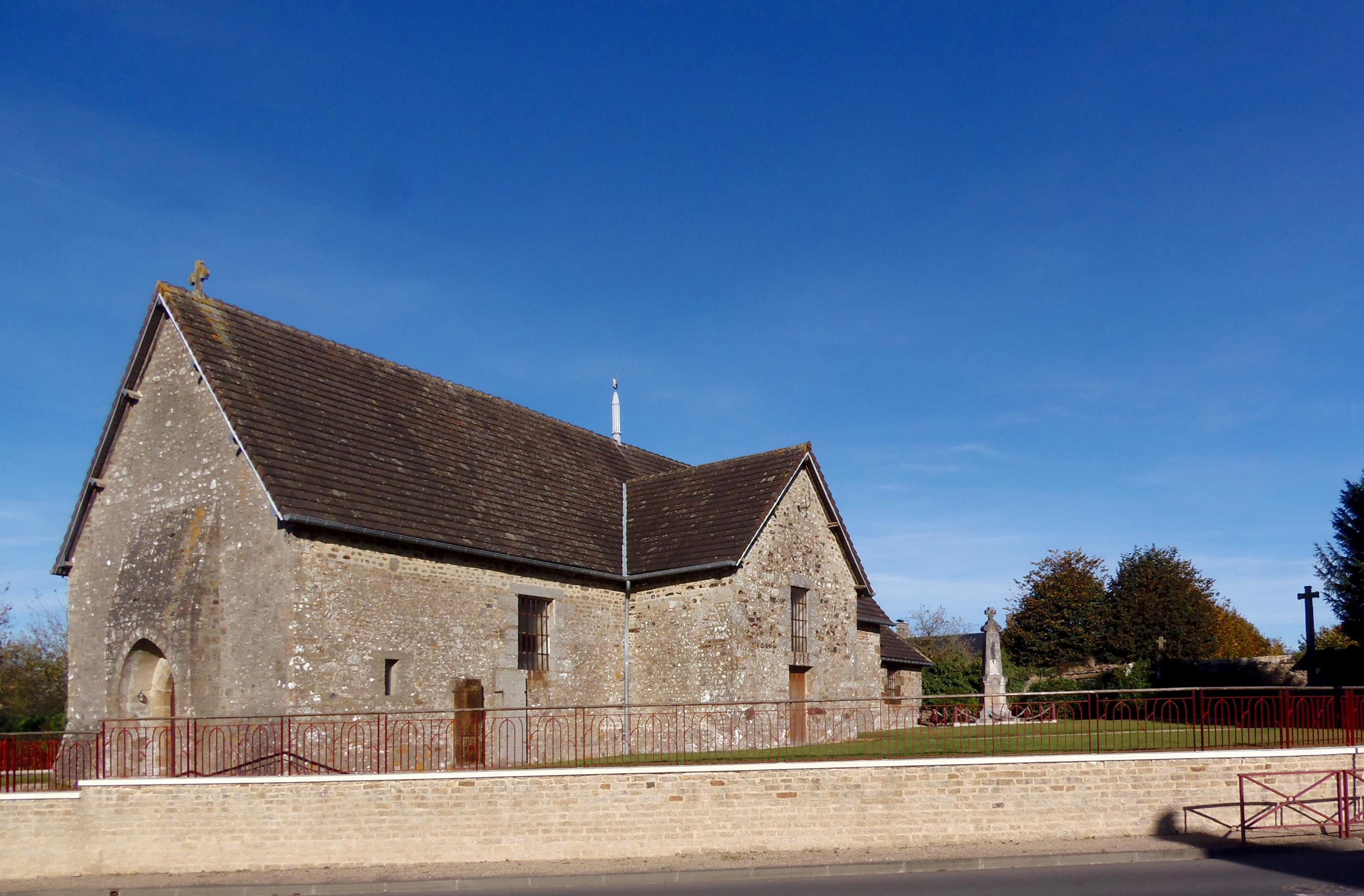 Saint-André-de-Messei (Normandie, France). L'église Saint-André.